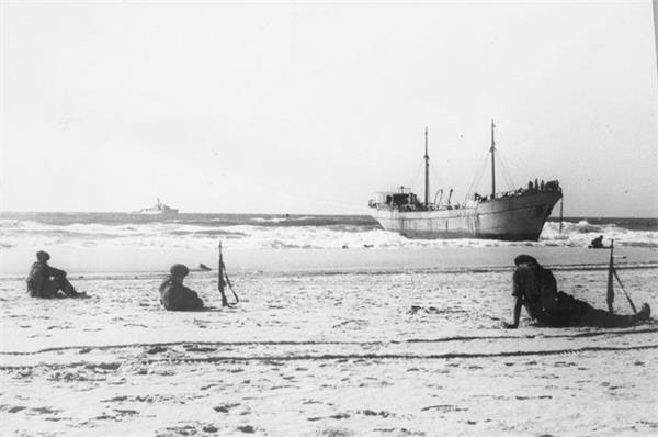 אנית המעפילים "שבתאי לוזינסקי" באשדוד